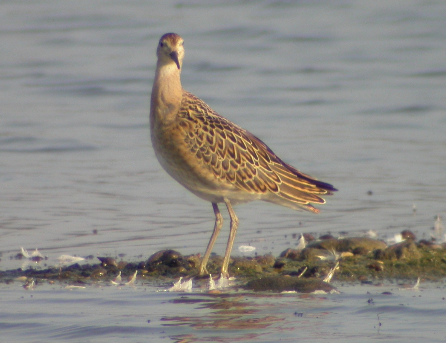 Kampfläufer (Philomachus pugnax) im Schlichtkleid im Schwäbischen Donaumoos.